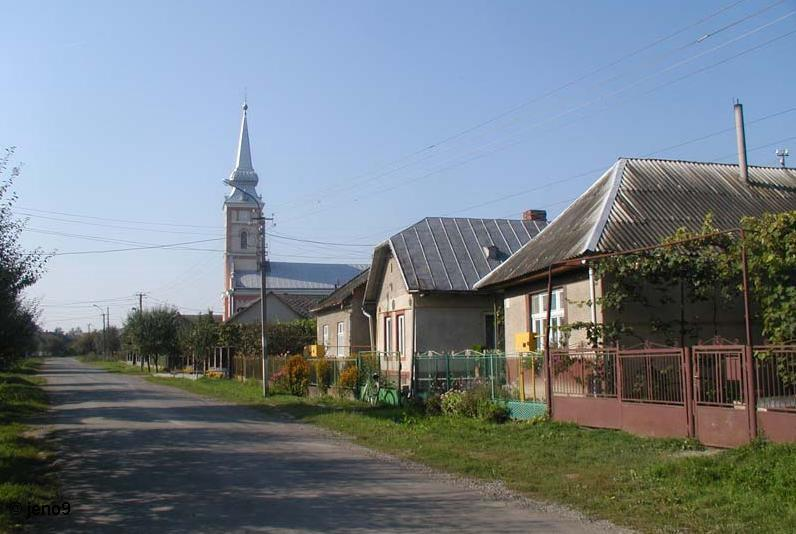 Tiszasalamon község